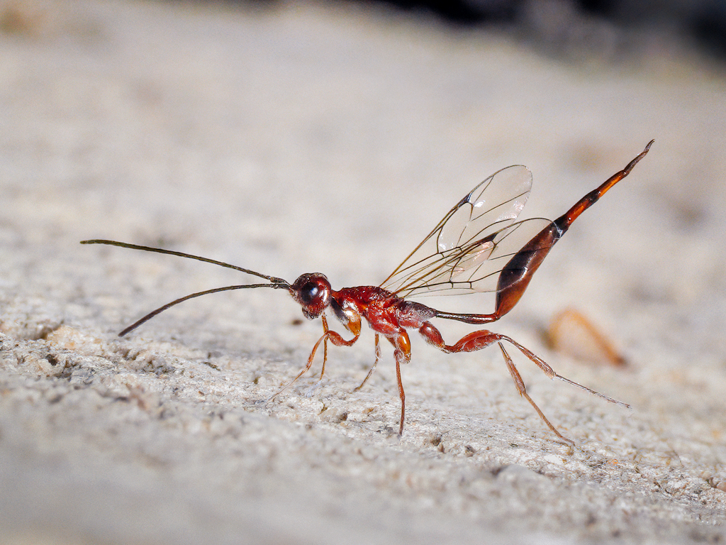 Vistal lateral de vespa parasitóide encontrada na mata atlântica do sudeste